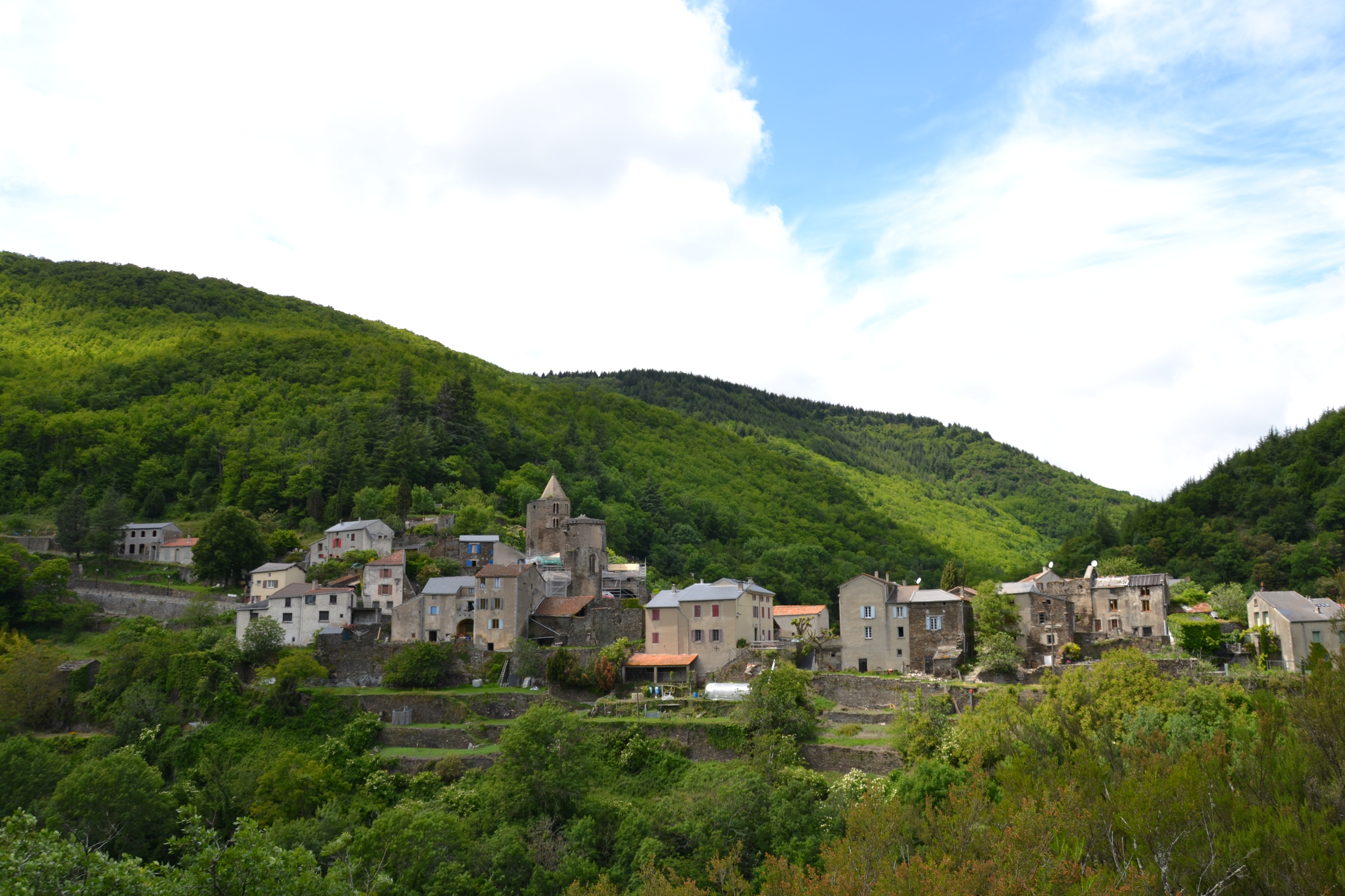 Vue générale de La Tourette-Cabardès